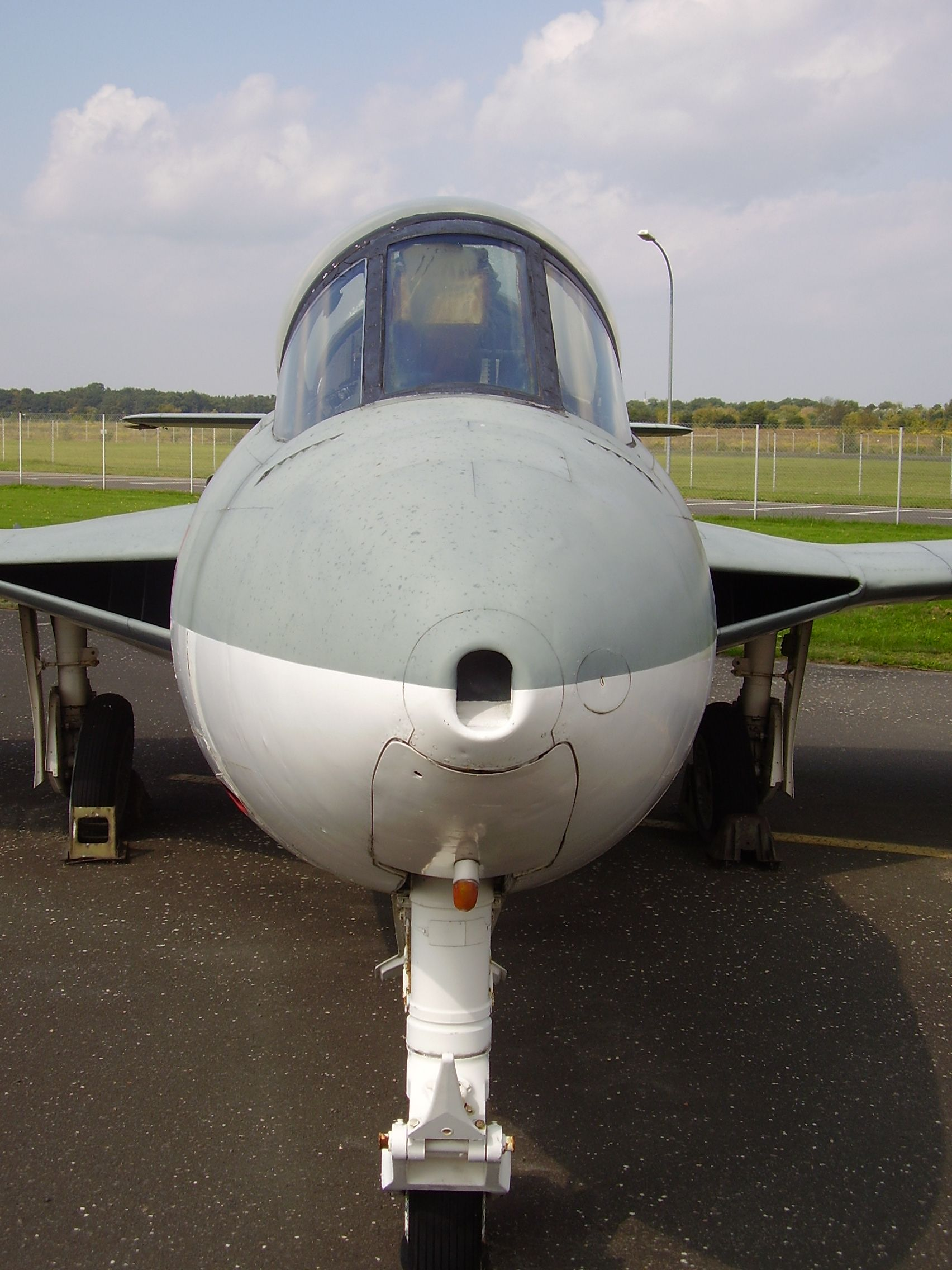 Luftwaffenmuseum der Bundeswehr; Airforce Museum of the Bundeswehr; Berlin-Gatow, Mk.4